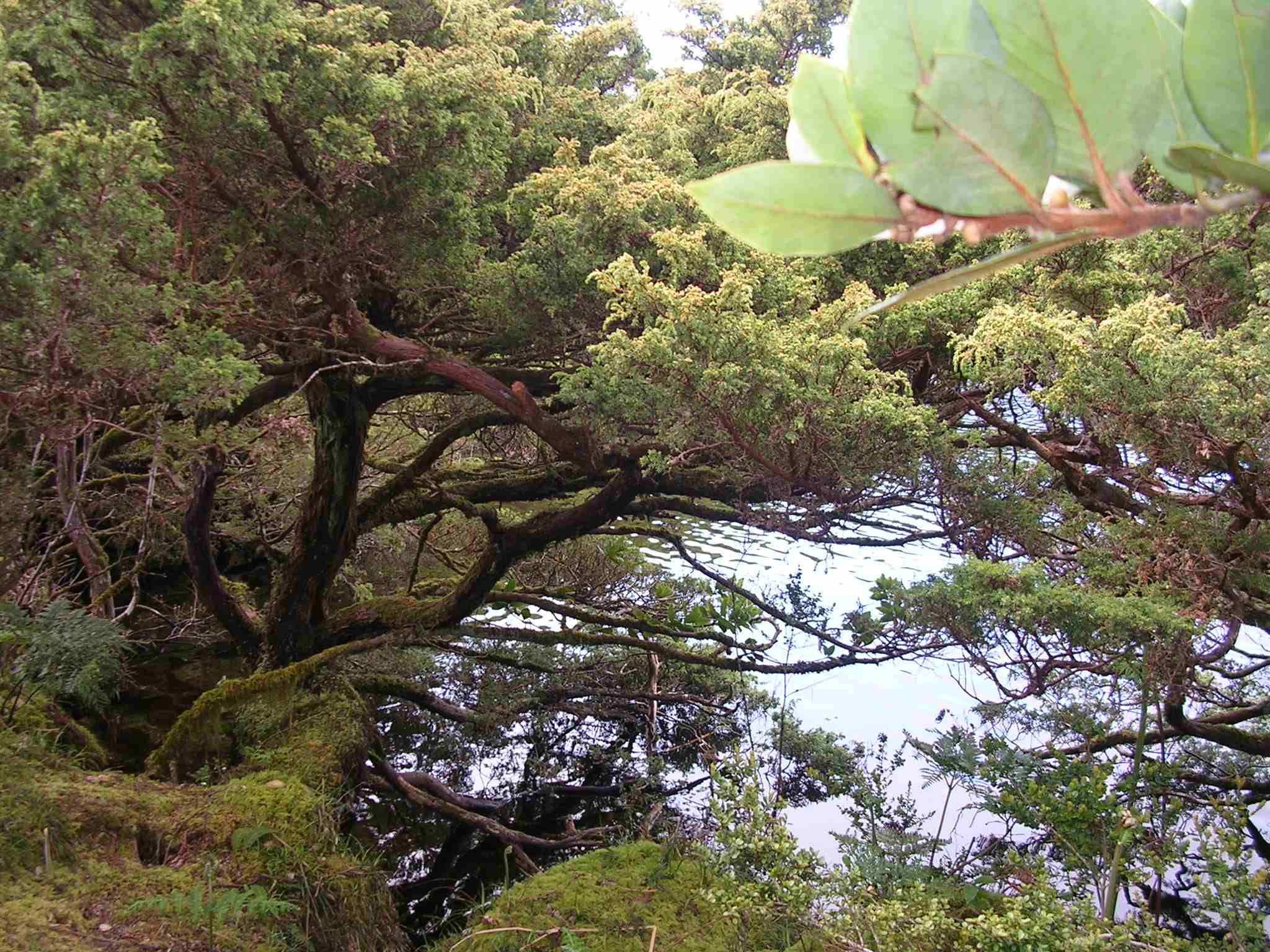 Lagoinha, Pico Negrão, ilha Terceira, Açores, Portugal.